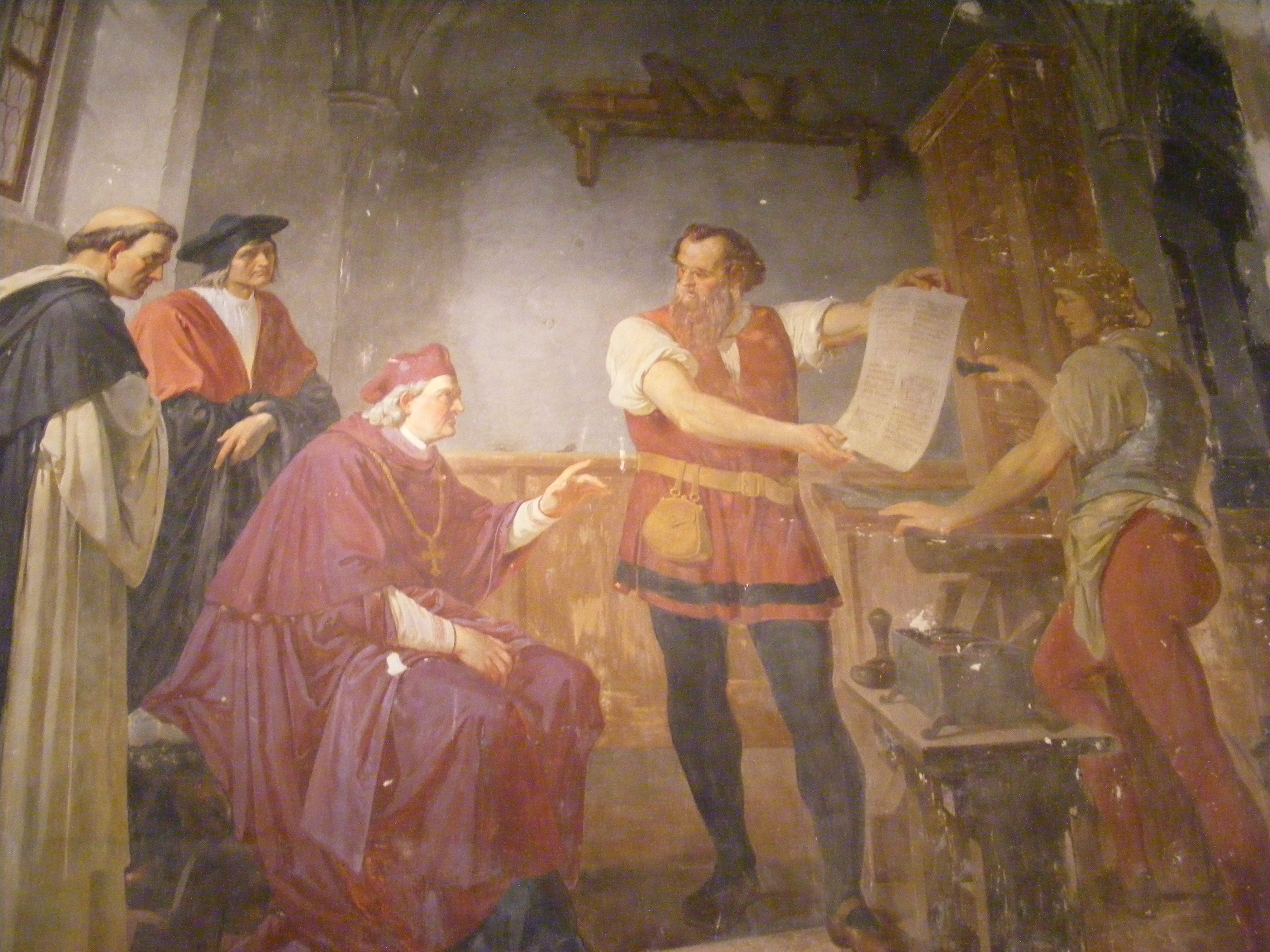 detail